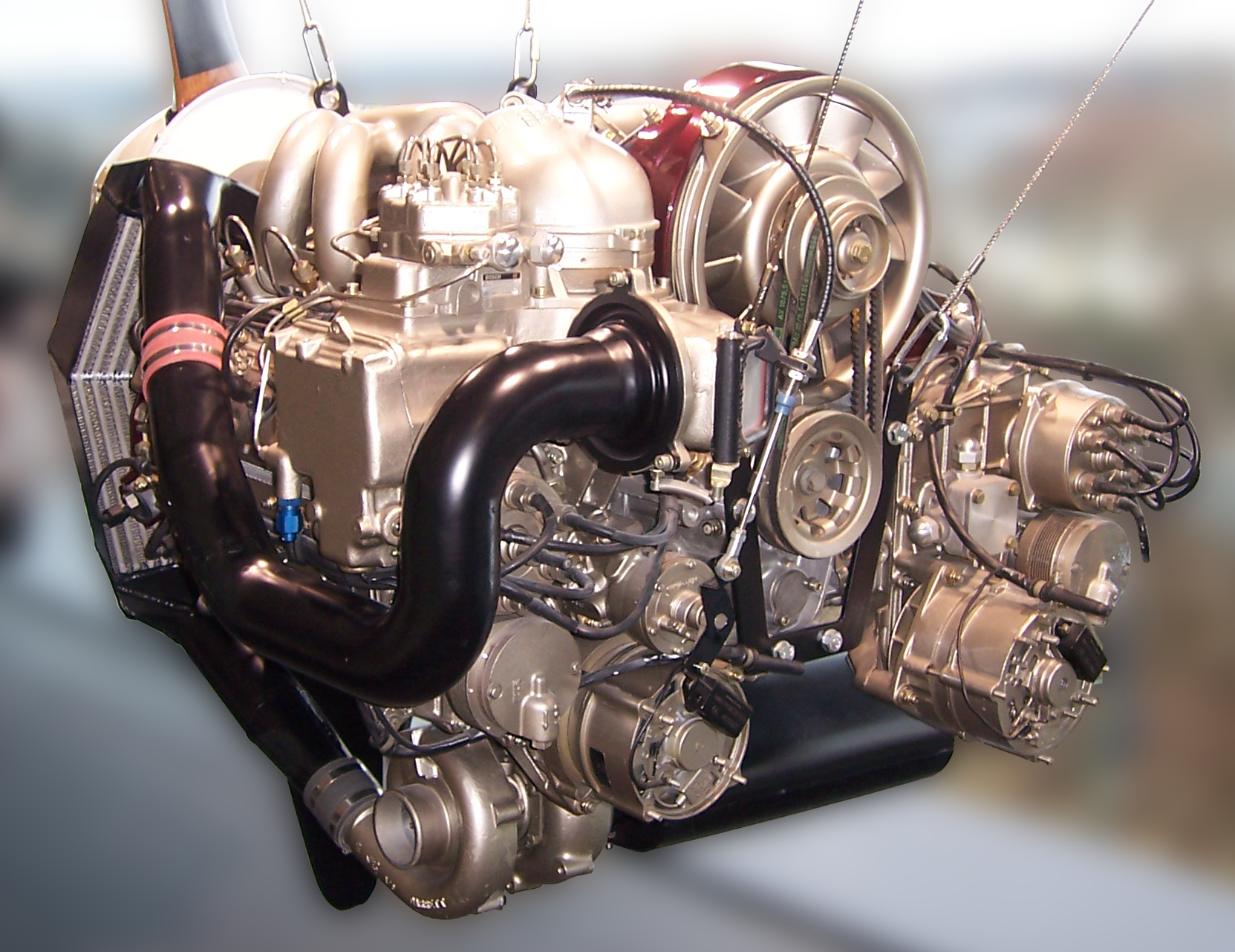 Porsche PFM 3200 im Porschemuseum. Ausführung mit Abgasturbolader.